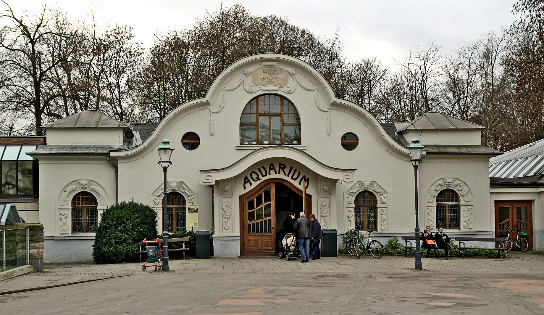 Aquarium im Zoo Leipzig. Camera data Camera Canon EOS 1000D Lens Sigma 17-70 mm 1:2.8-4.5 DC Macro Focal length 28 mm Aperture f/6.3 Exposure time 1/80 s Sensivity ISO 100